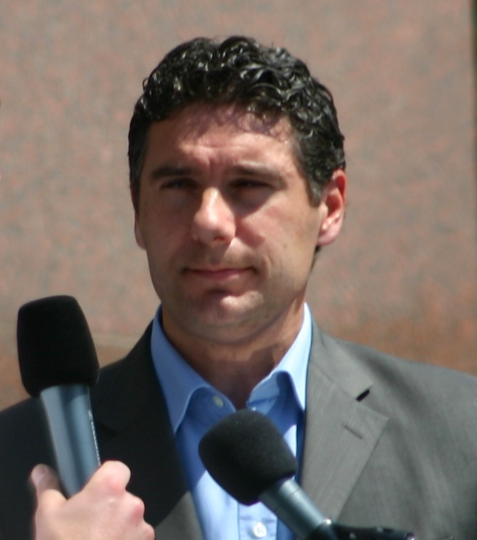 Gene Principe in 2006